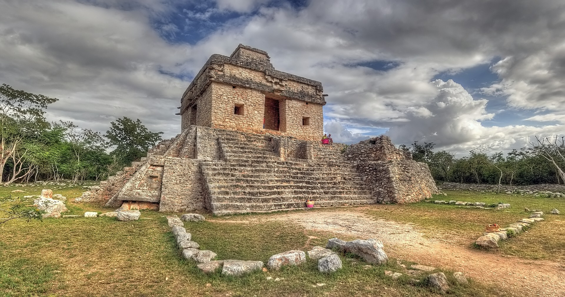 Dzibichaltún, pirámide con ventanas